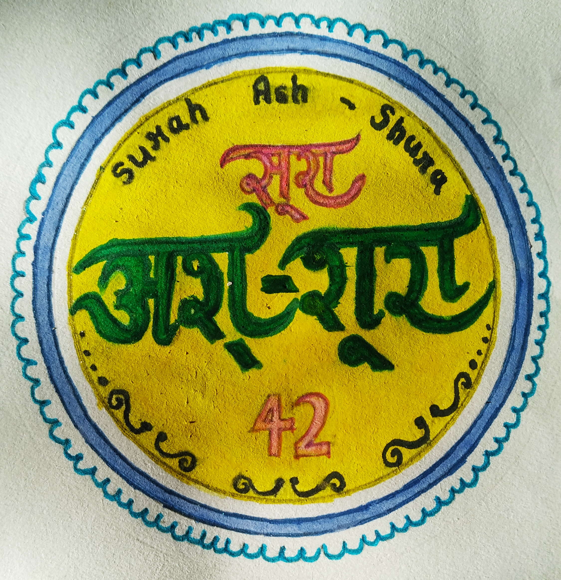 Art work Quran-surah-42-name-hindi